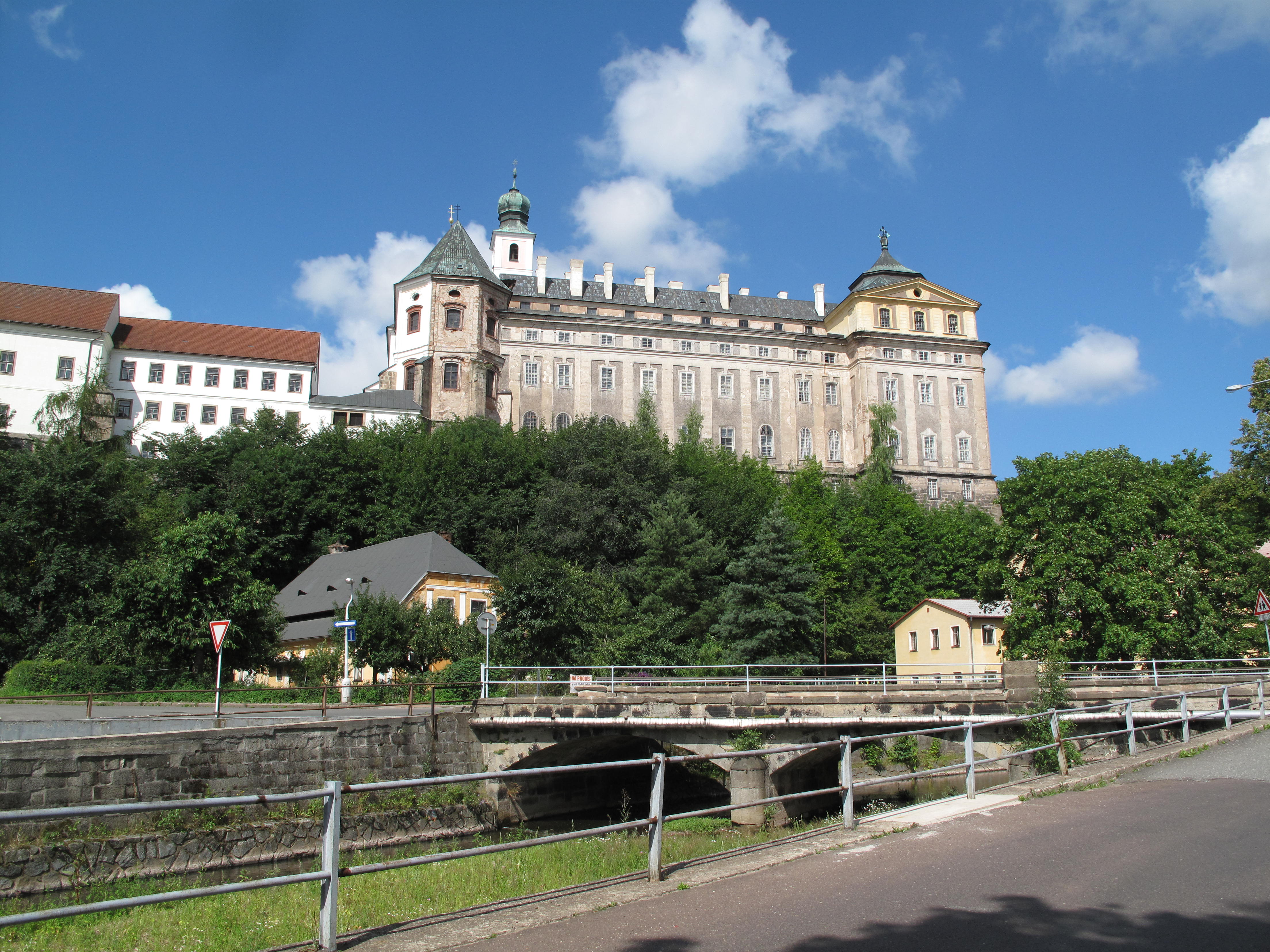 Broumov